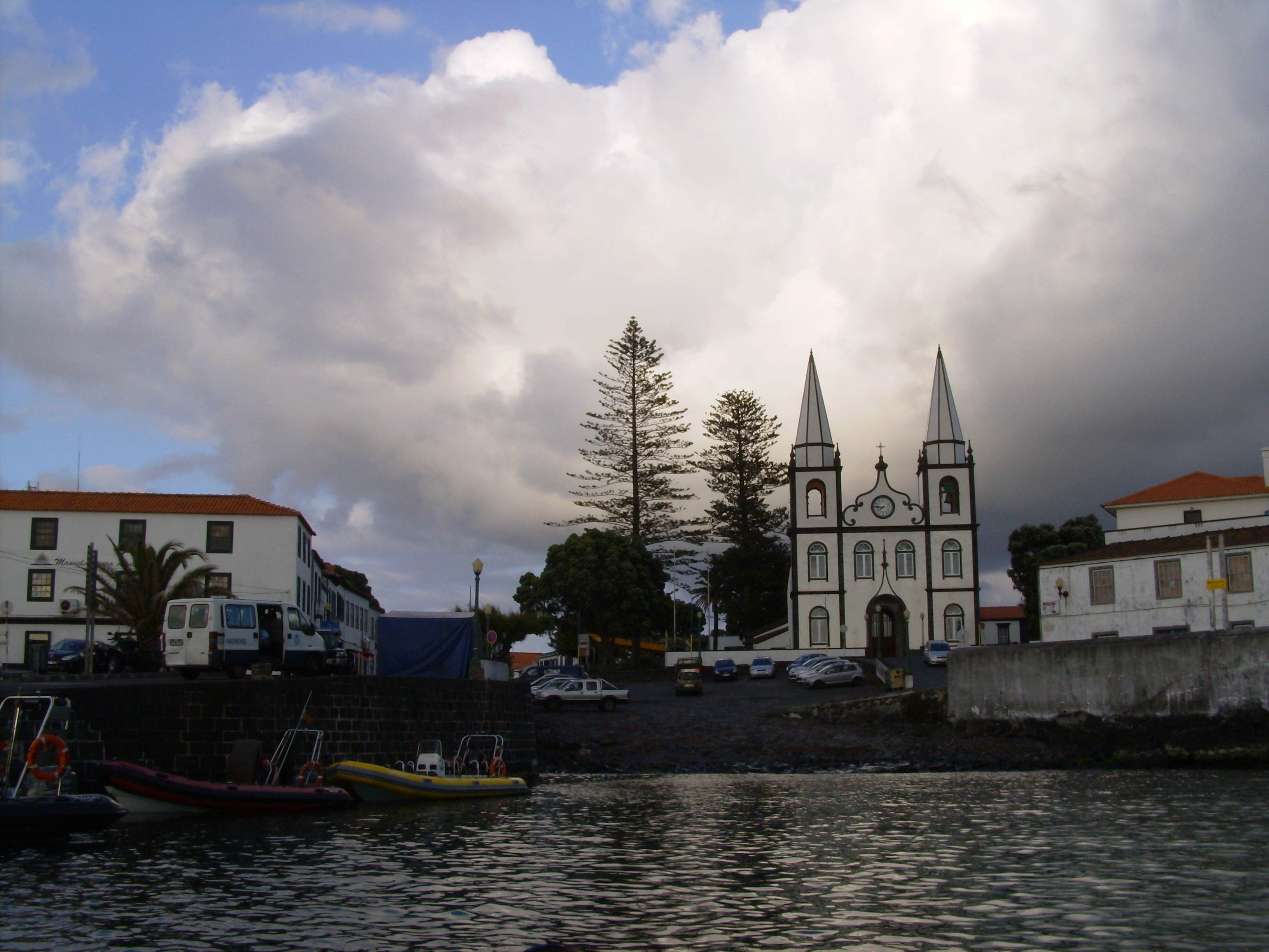 Cais da Areia Funda, freguesia e concelho da Madalena do Pico, ilha do Pico, Açores. Ao fundo, a Igreja da Madalena do Pico.